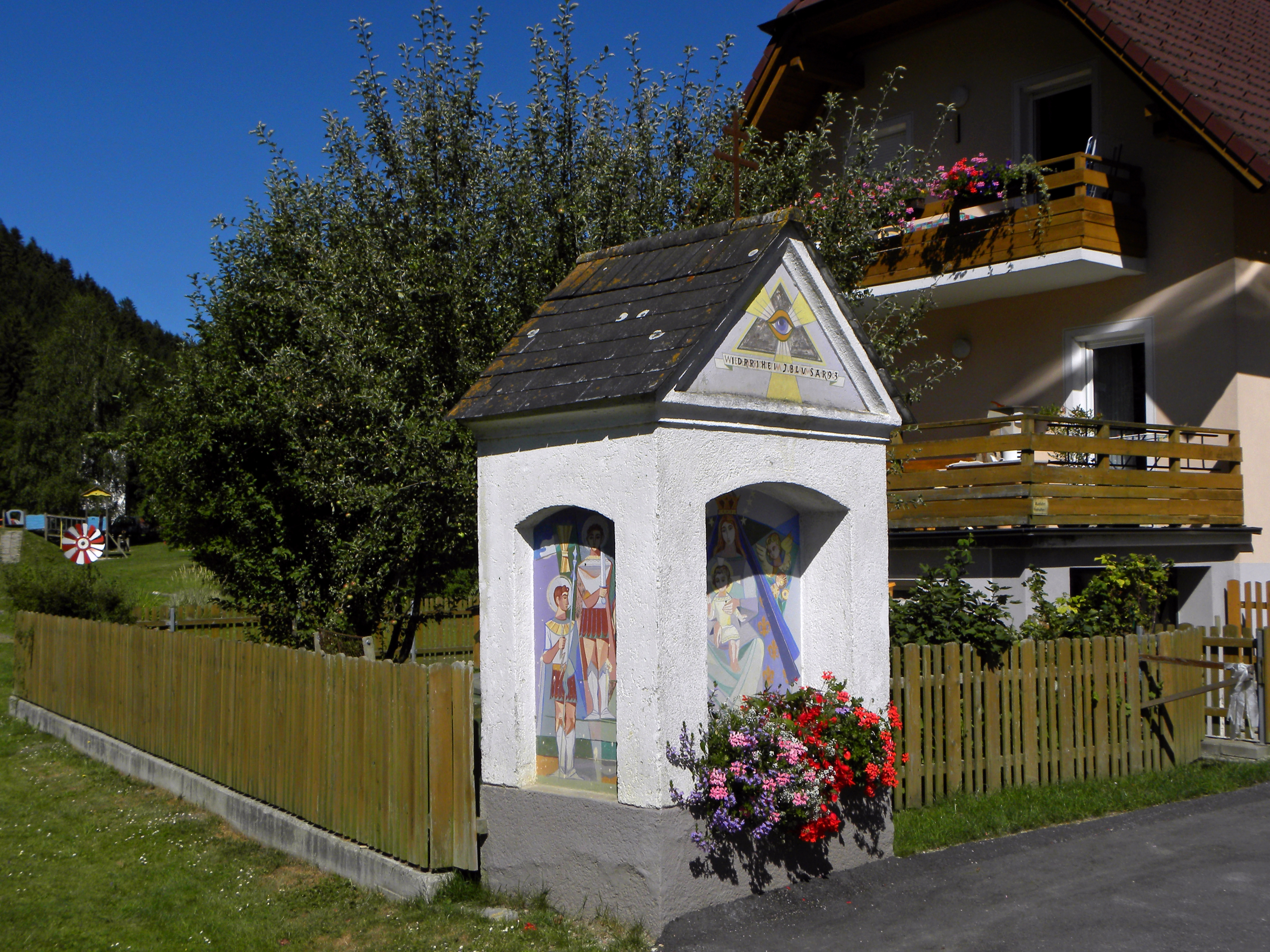 Pestkreuz in Mönichwald - Das Pestkreuz wurde in Anlehnung an das 1723 errichtete und 1956 umgefallene Vorgängermodell geschaffen, welches ein Werk von Johann Hackhofer war. Der Bau erfolgte durch Baumeister Singer aus Hartberg, die künstlerische Ausgestaltung oblag Adolf Osterider. Im Osten zeigt der Bildstock eine Darstellung der Gottesmutter, im Norden die Pestpatrone Rochus und Sebastian und im Süden die Wetterpatrone Johannes und Paulus.